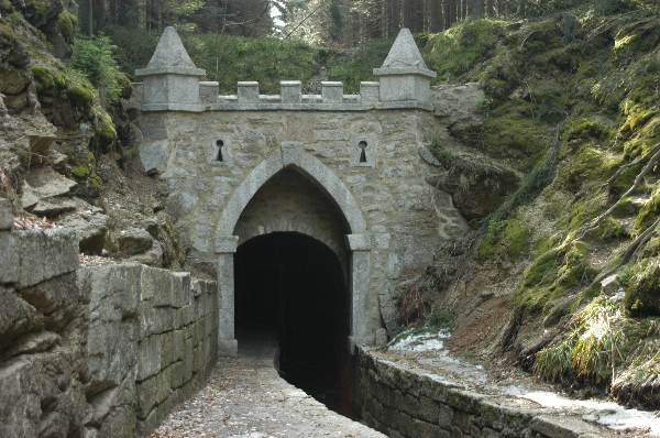 Eingang zum Schwarzenbergischen Schwemmkanal-Tunnel